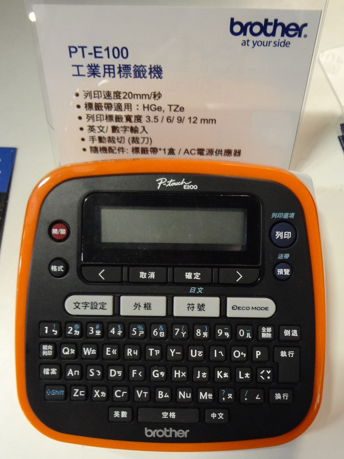 2013年資訊月的兄弟牌工業用標籤機PT-E200。上方誤放PT-E100的解說牌。